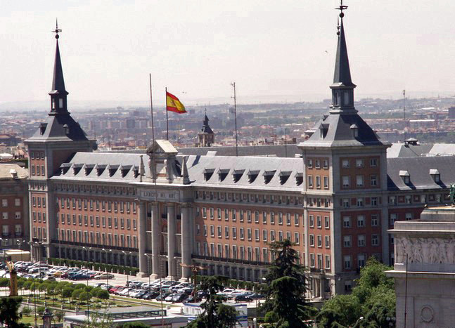 Cuartel General del Ejercito del Aire